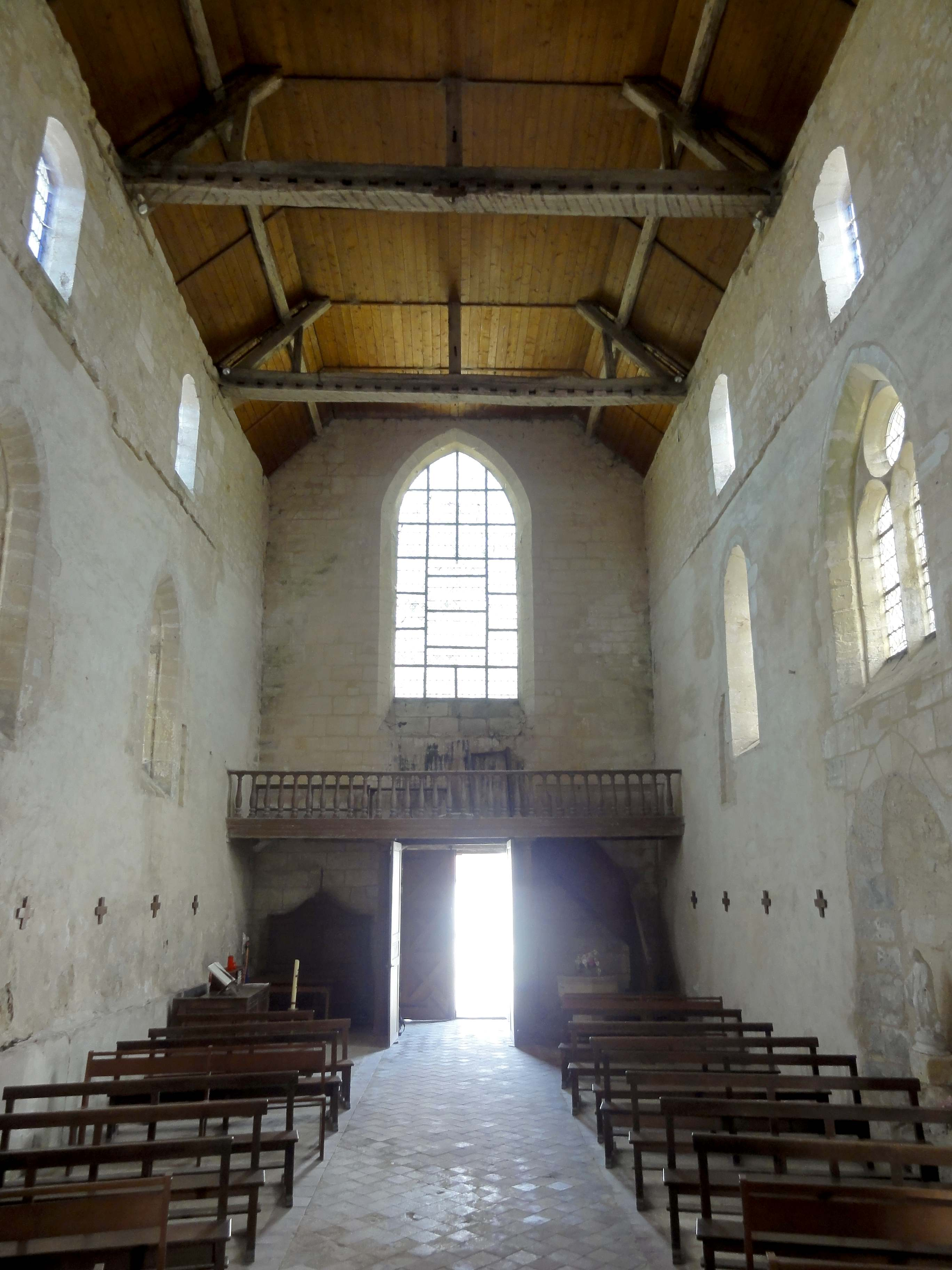 Intérieur de l'église (voir titre).